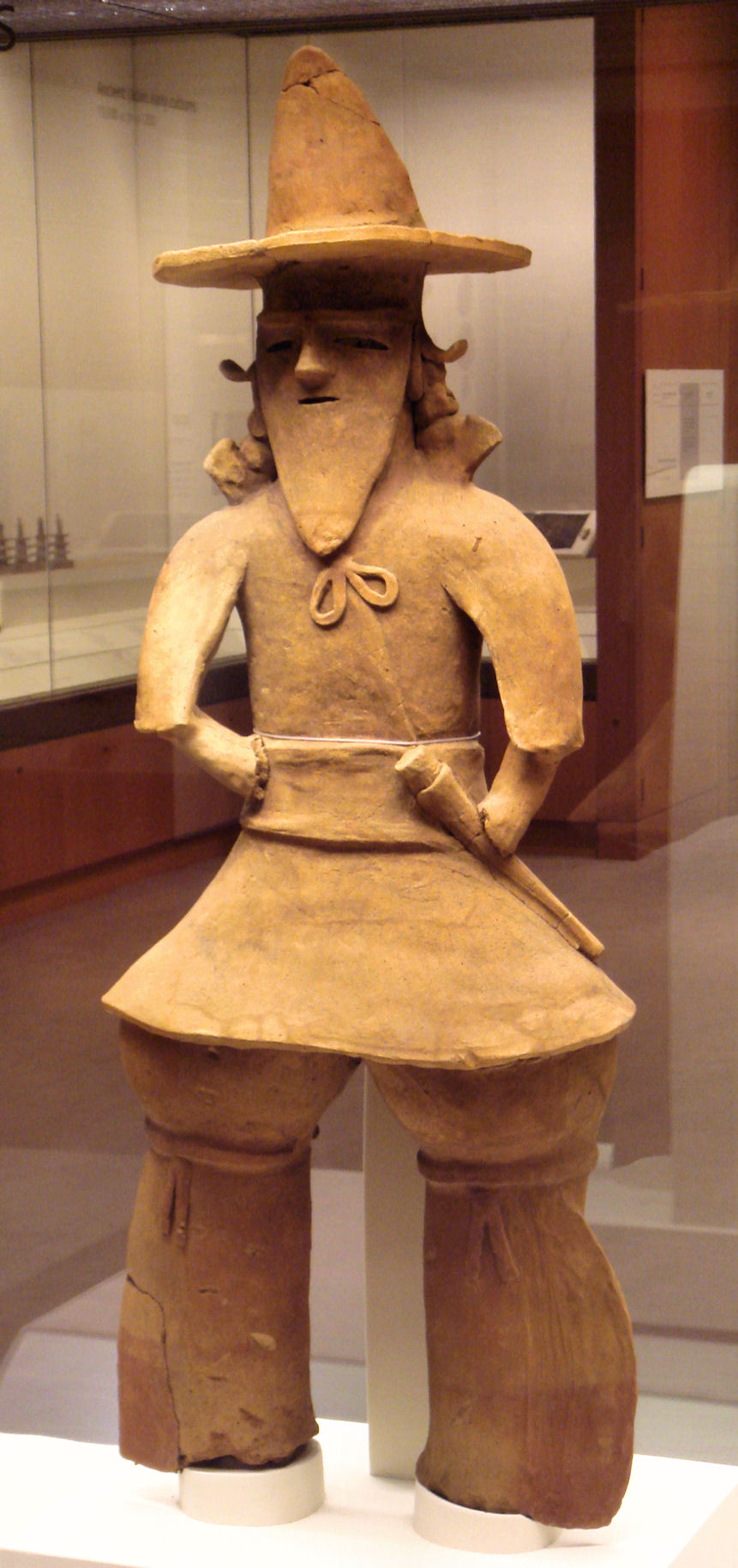 Kofun period Haniwa chieftain, Ibaraki, 500CE.